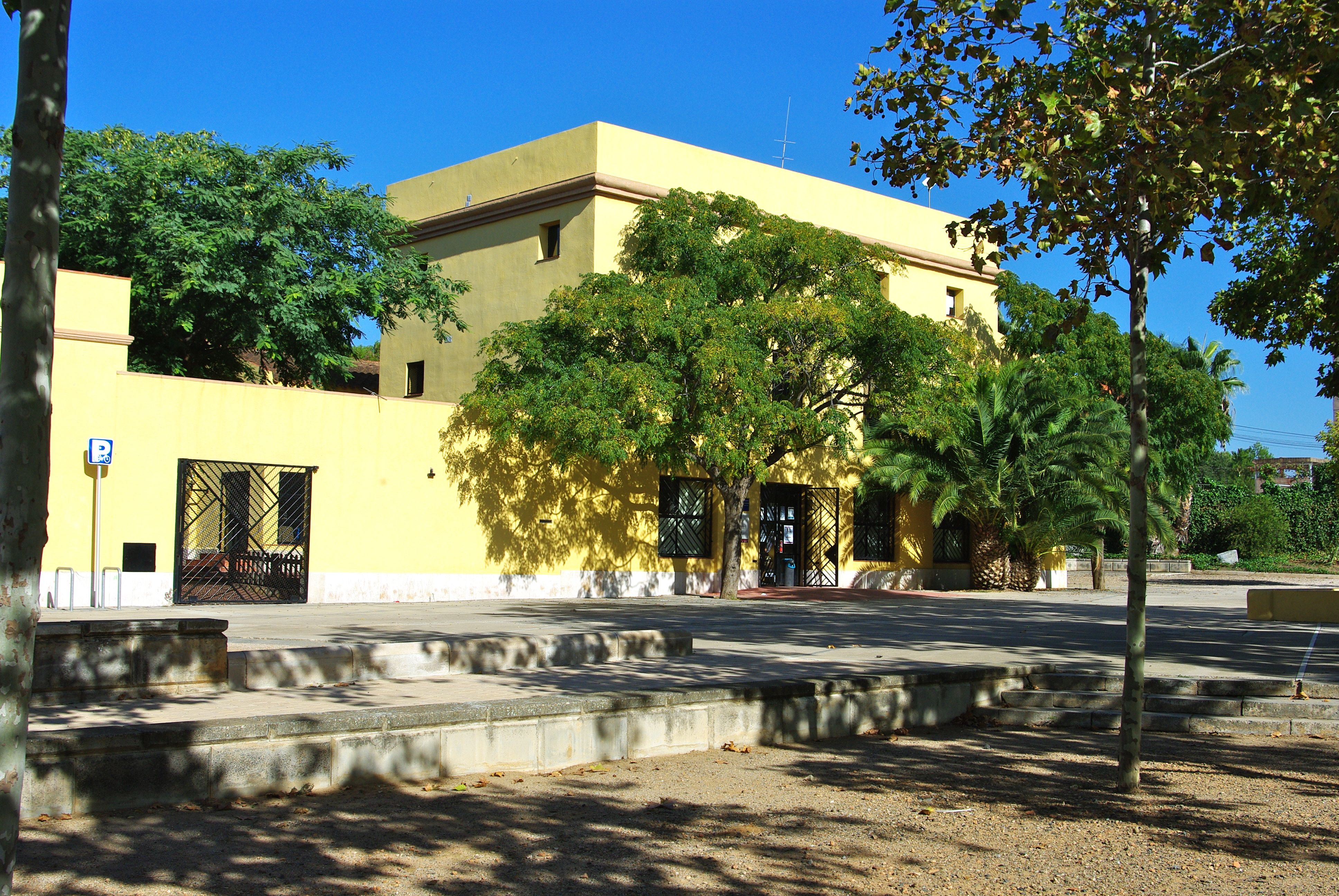 Mas de l'Abelló al barri de sant Josep Obrer, a Reus